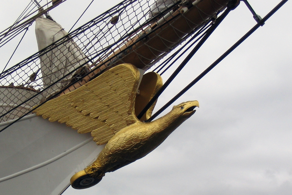 Galionsfigur der USCG Eagle, aufgenommen während ihres Aufenthaltes in Bremerhaven